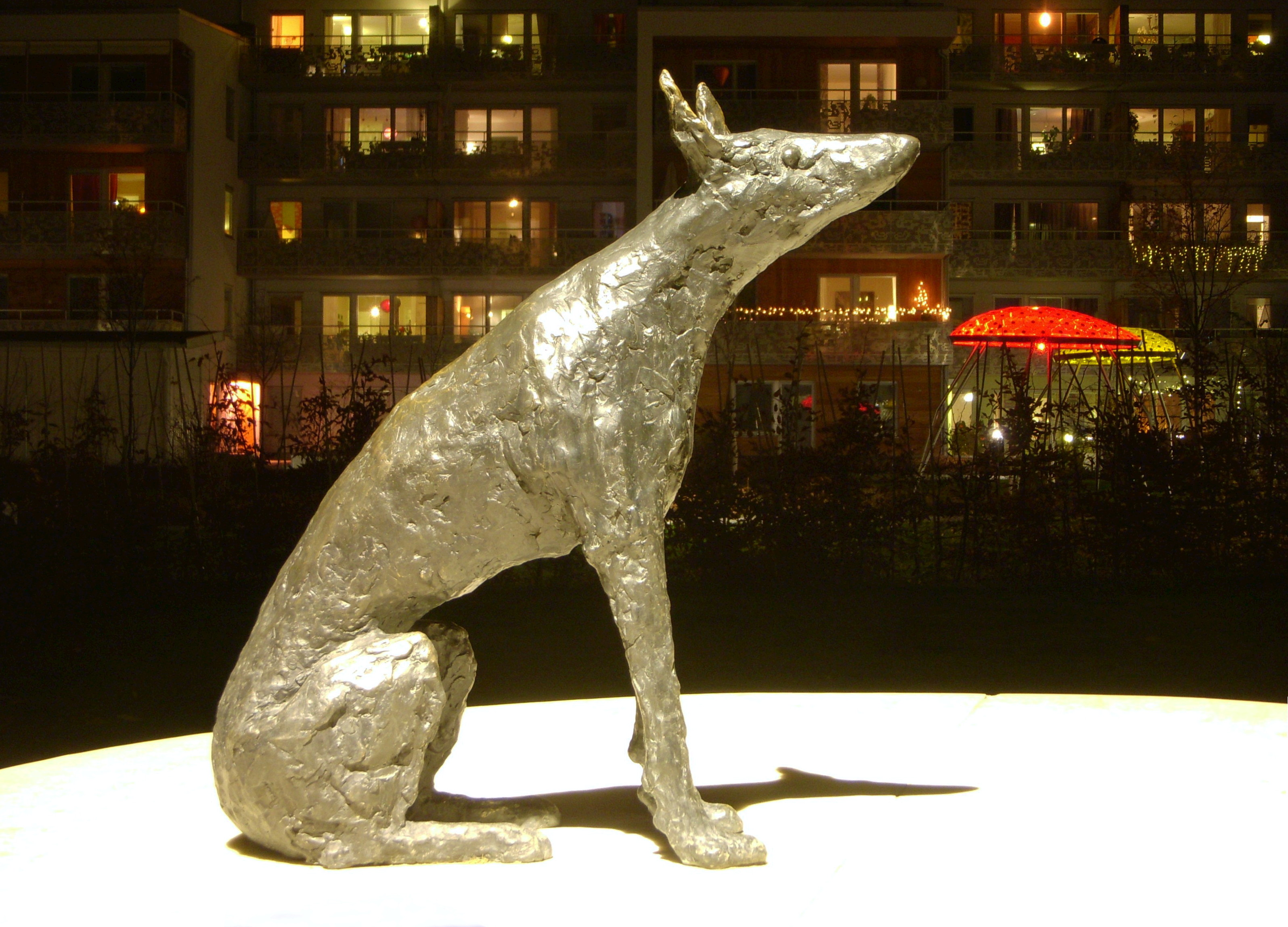 I väntan på någon, skulptur i brons och marmor av Måna Grivner (1946–), rest 2009 vid Förskeppsgatan 5 i Södra Hammarbyhamnen i Stockholm